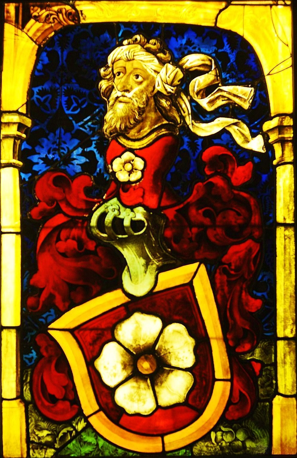 Wappen derer von Müllenheim (Glasfenster)